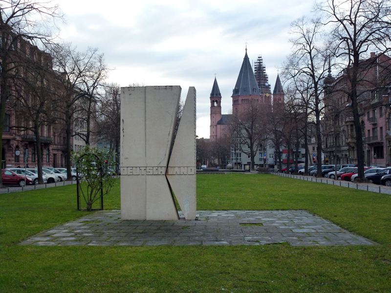 Albert Karl Spelthahn (Entwurf), Paul Sauer (Ausführung), „Mahnmal der Deutschen Einheit“, ursprünglich „Mahnmal des Deutschen Ostens“ 1961, Fischtorplatz, Mainz